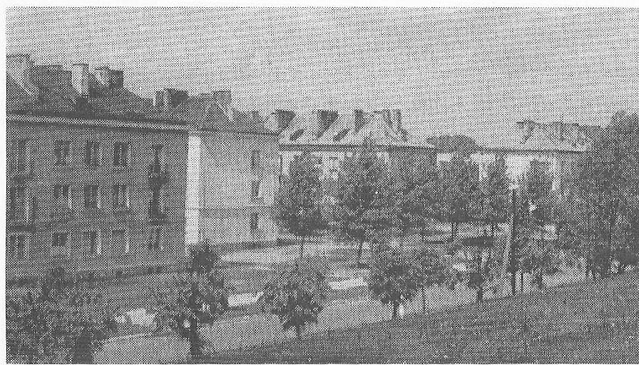 Osiedle Millenium w Hajnówce - lata 60-te.